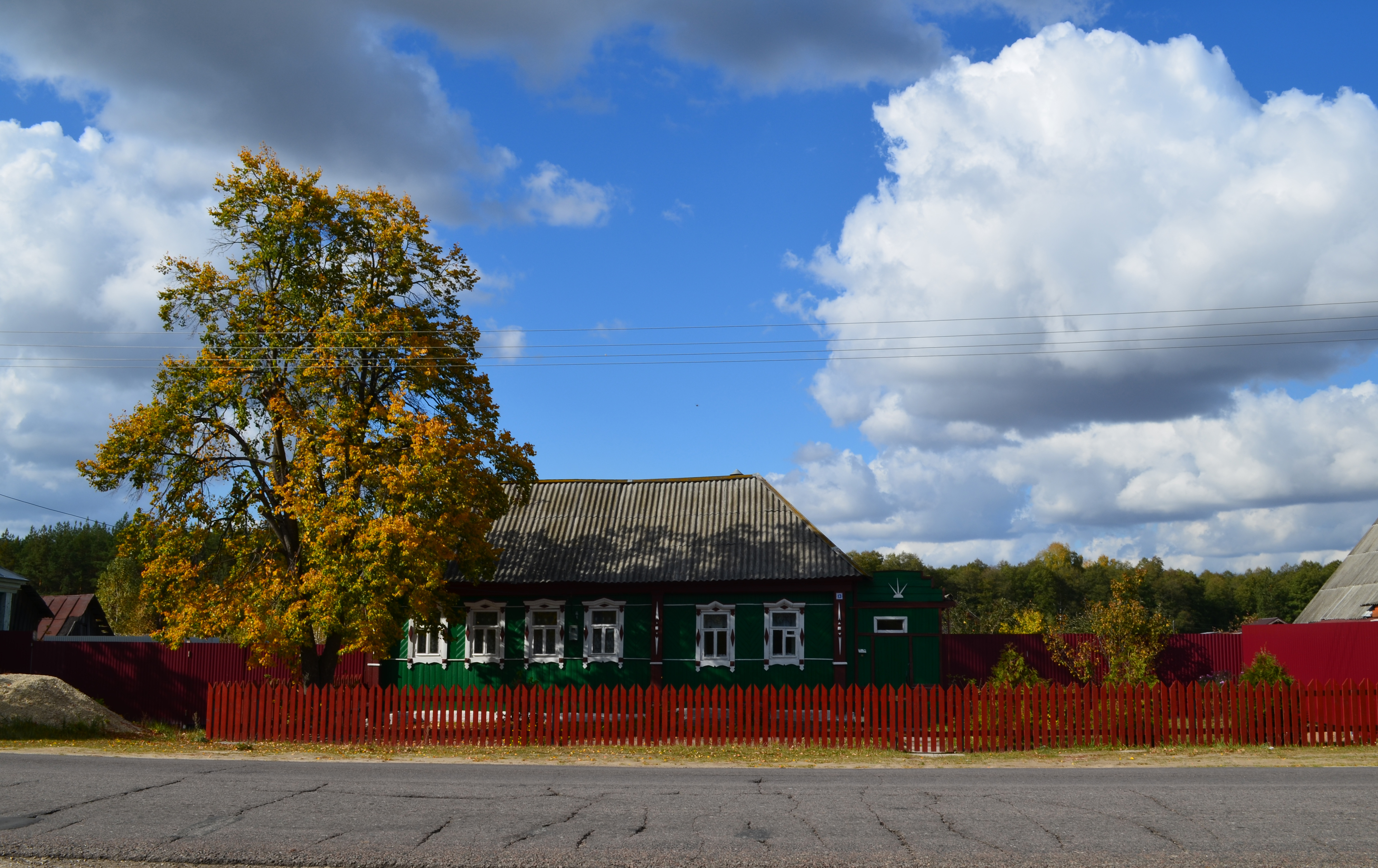 Село Ласково Рязанского района Рязанской области-родина святой Февронии.